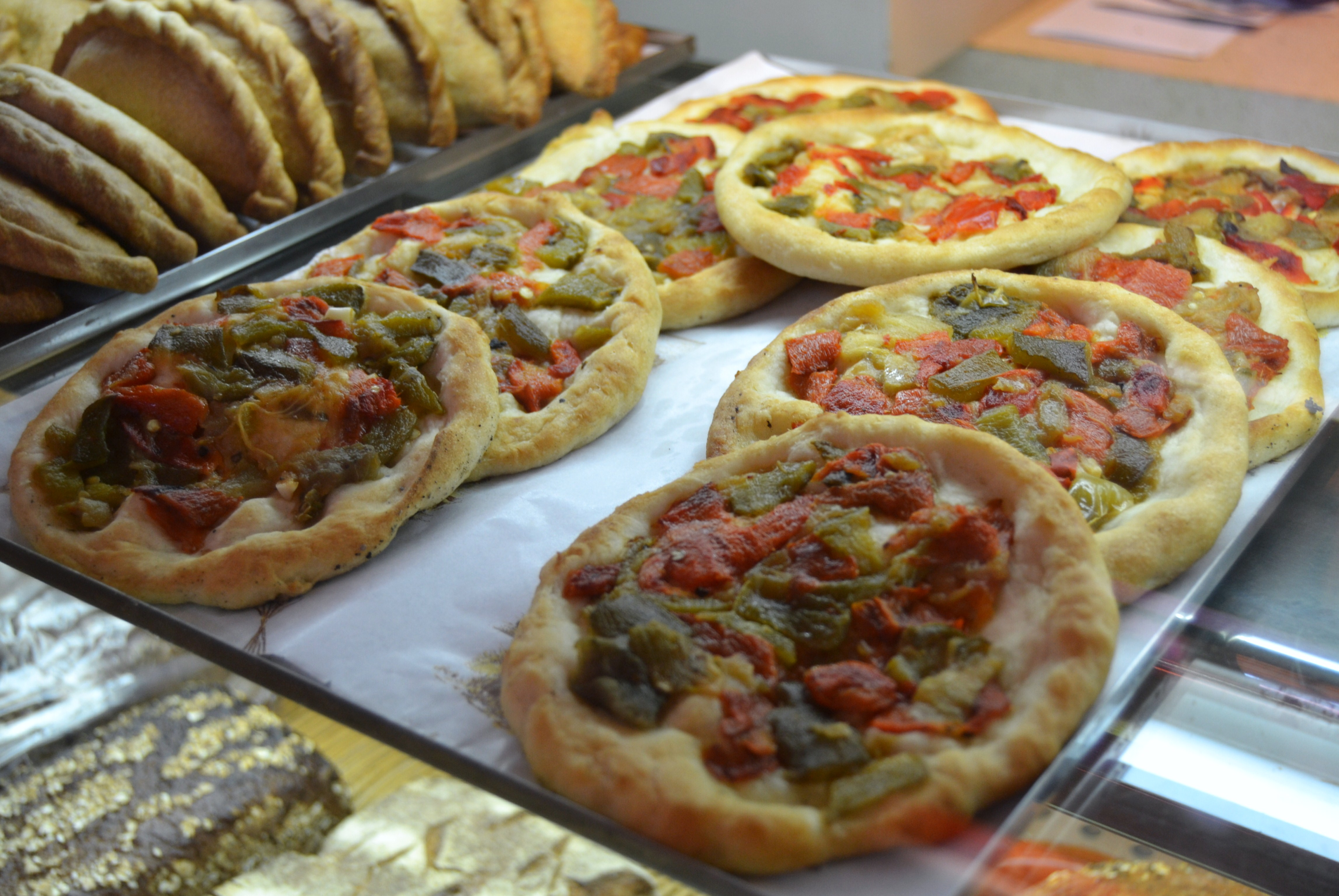 Coques al mercat de Xàbia.